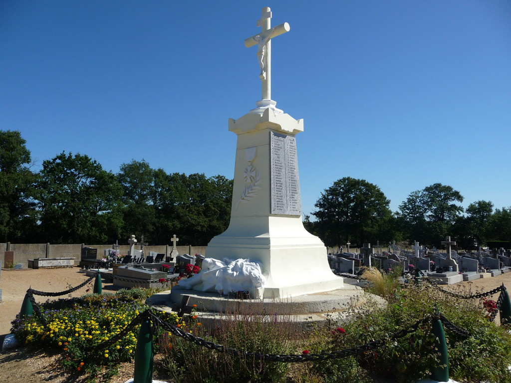 Monument aux morts 14-18 de Fay-de-Bretagne (44)